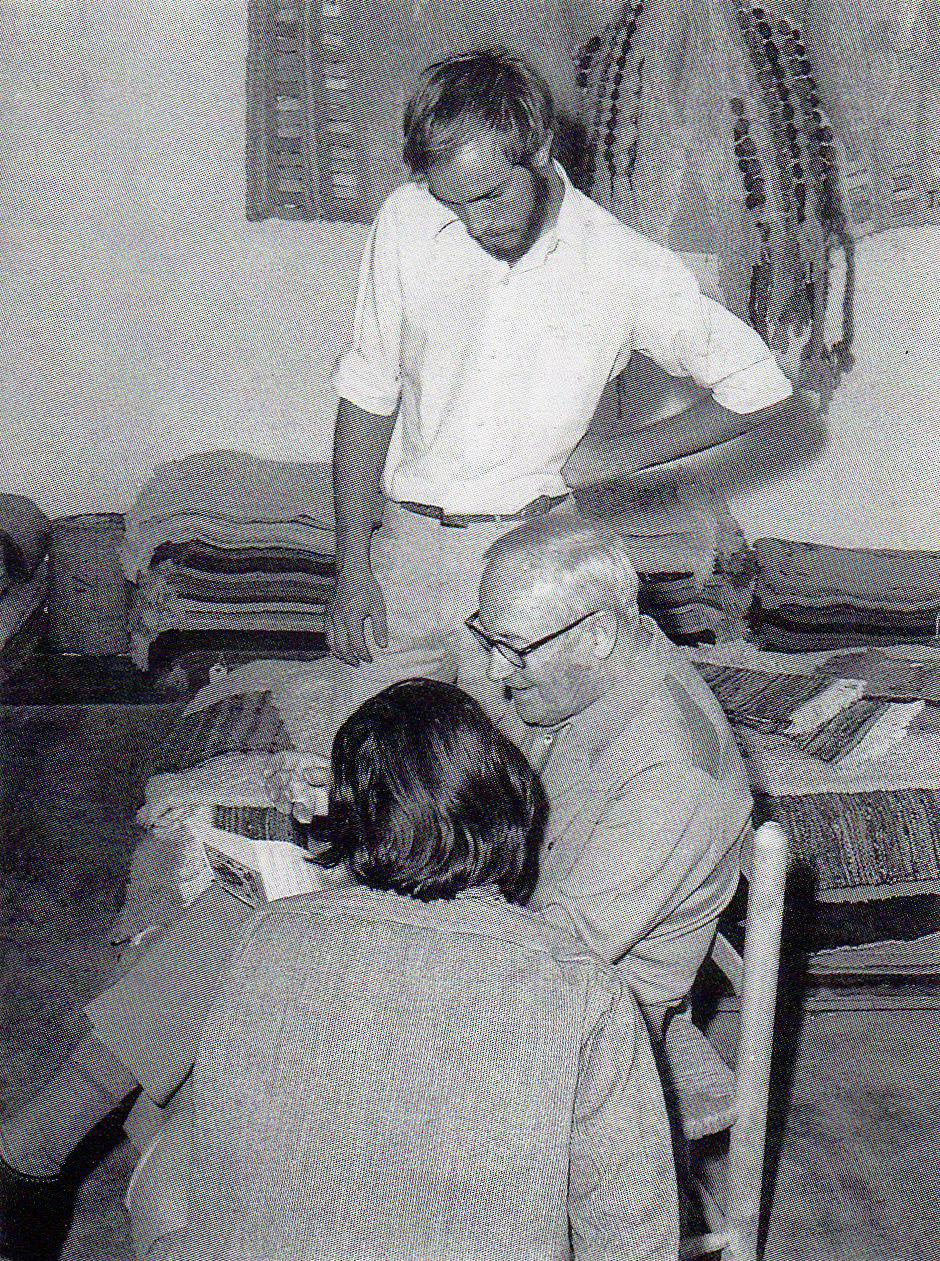 Miró, Delclaux i Royo conversant a la fàbrica Aymat, 1970